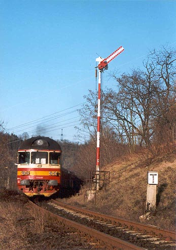 853.006 vjíždí do Vraného nad Vltavou